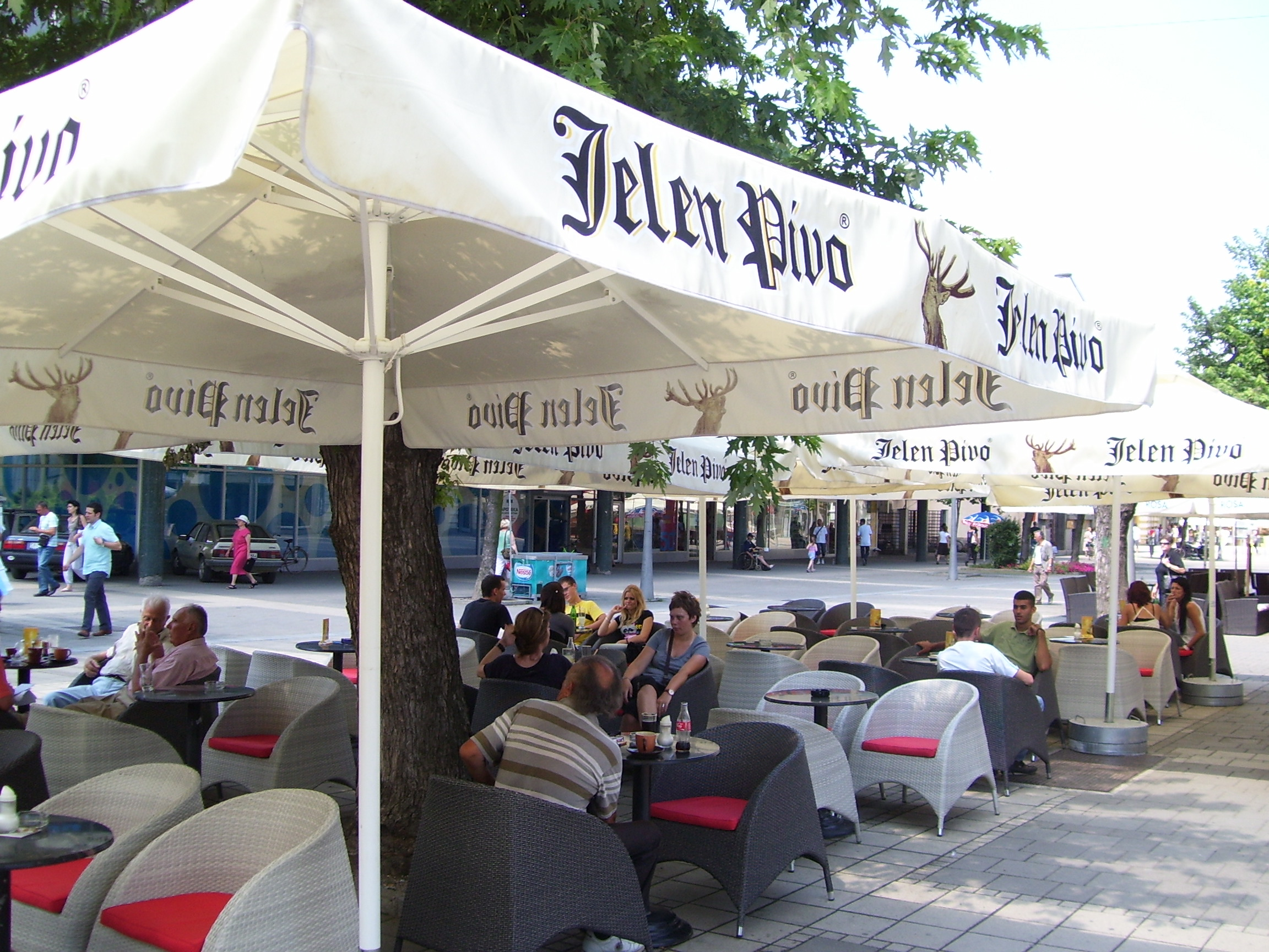 Аутор слике је корисник:SRB Maric IT Слика је урађена обичним фотоапаратом. Датум: 15-07-2010.